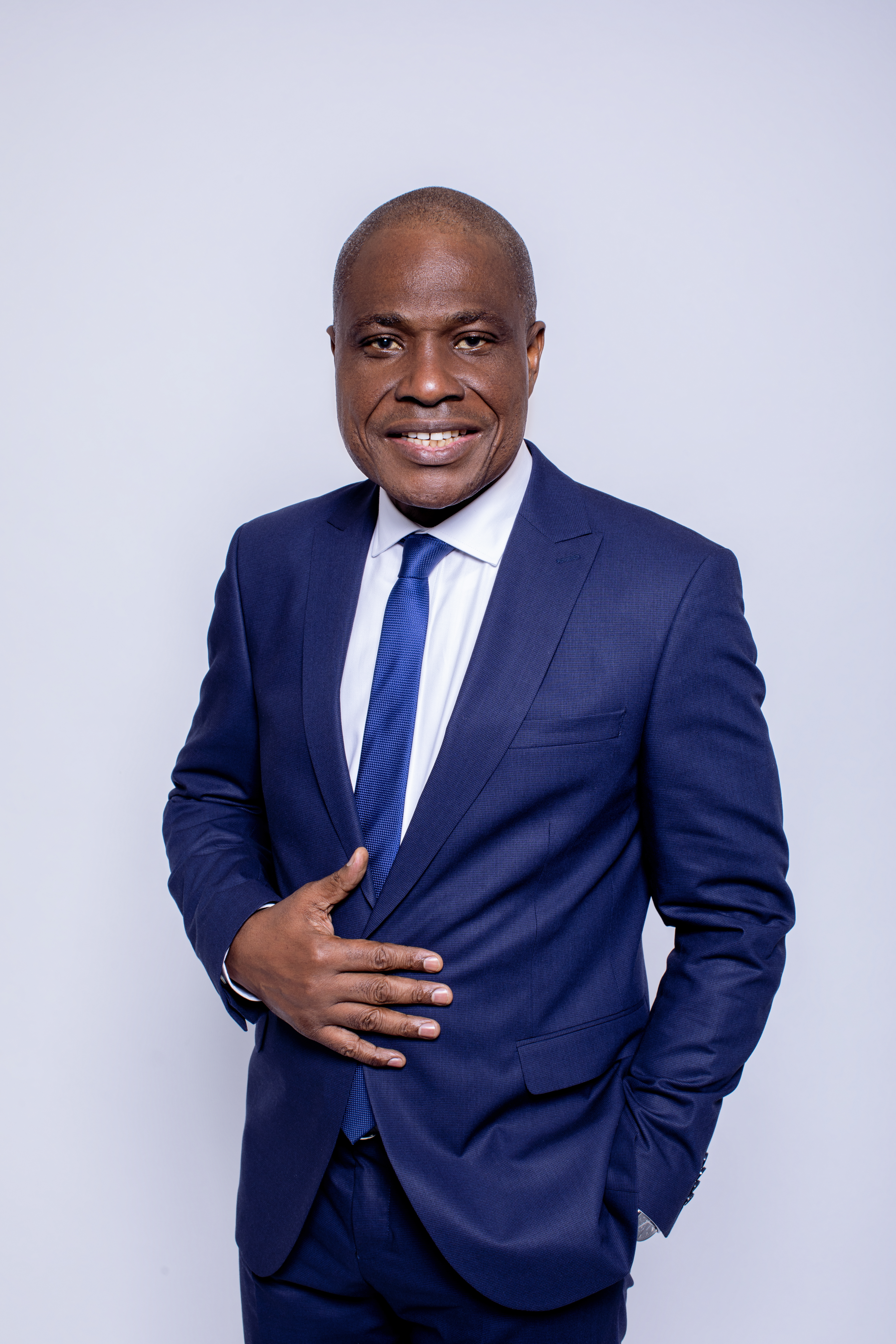 Ezra Sierra © 2018